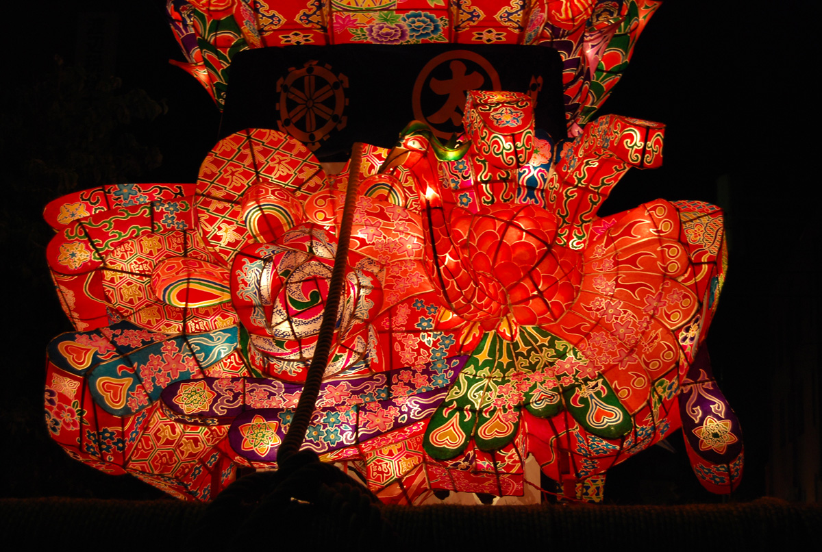 富山県砺波市で行われる夜高祭。夜高行燈です。